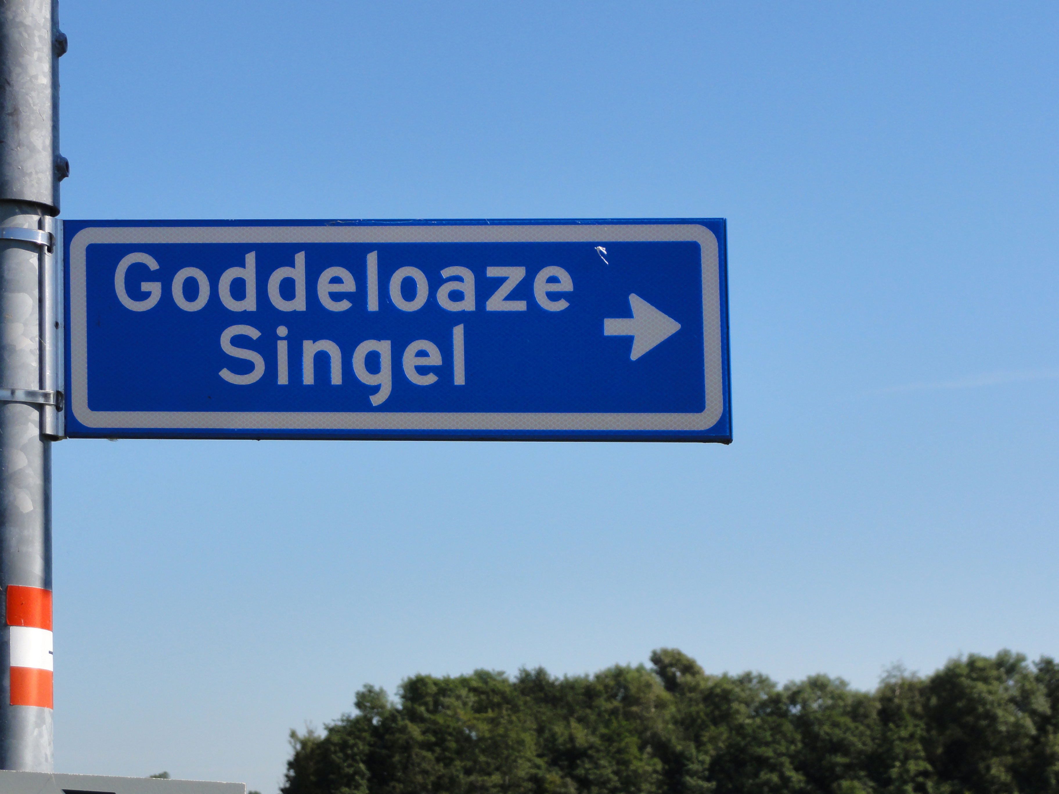 Straatnaambord de Goddeloaze singel (Goddeloze singels)